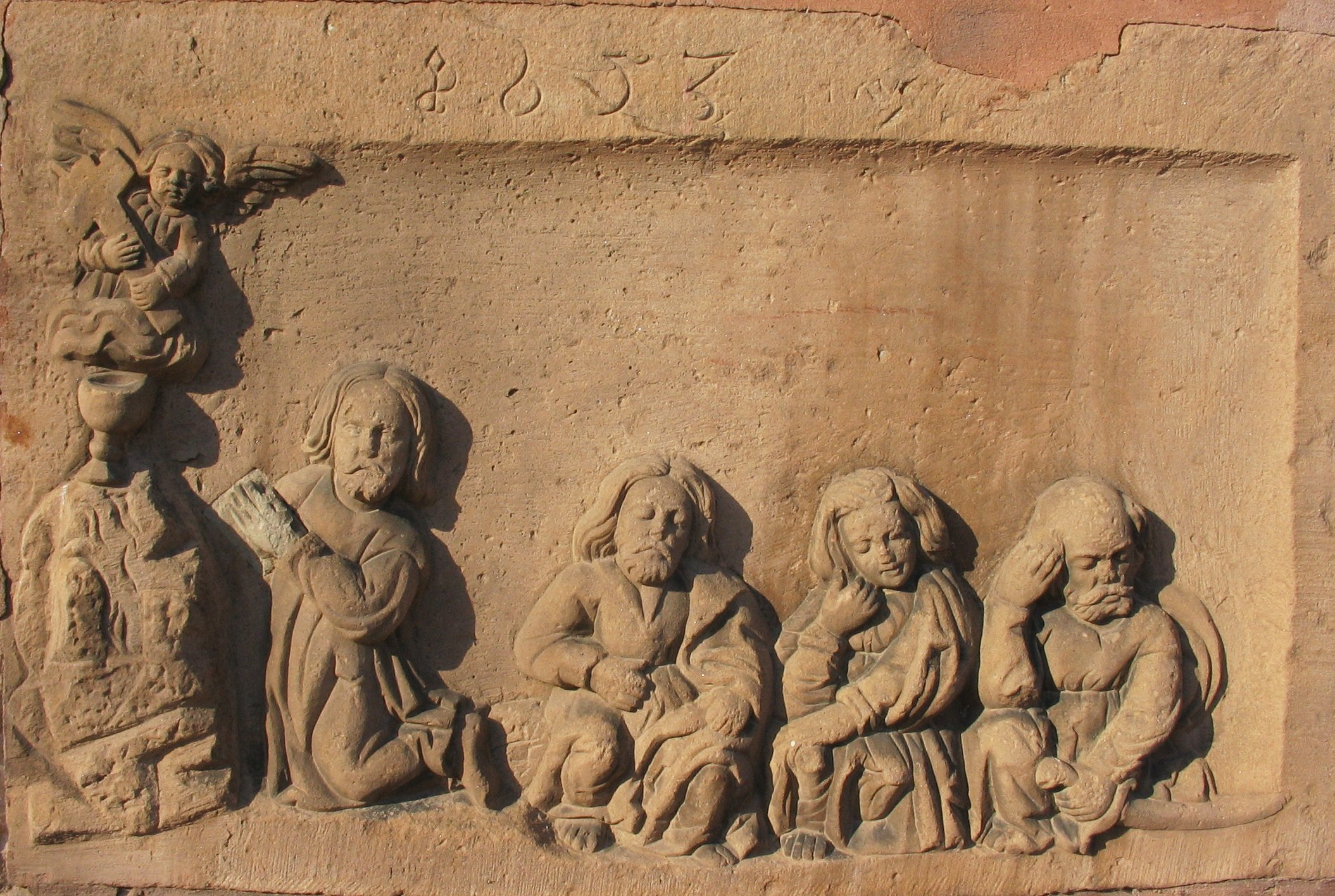 Bas-relief daté de 1653 sur l'église Sainte-Richarde à Marlenheim (Bas-Rhin). Il représente la scène du Mont des Oliviers